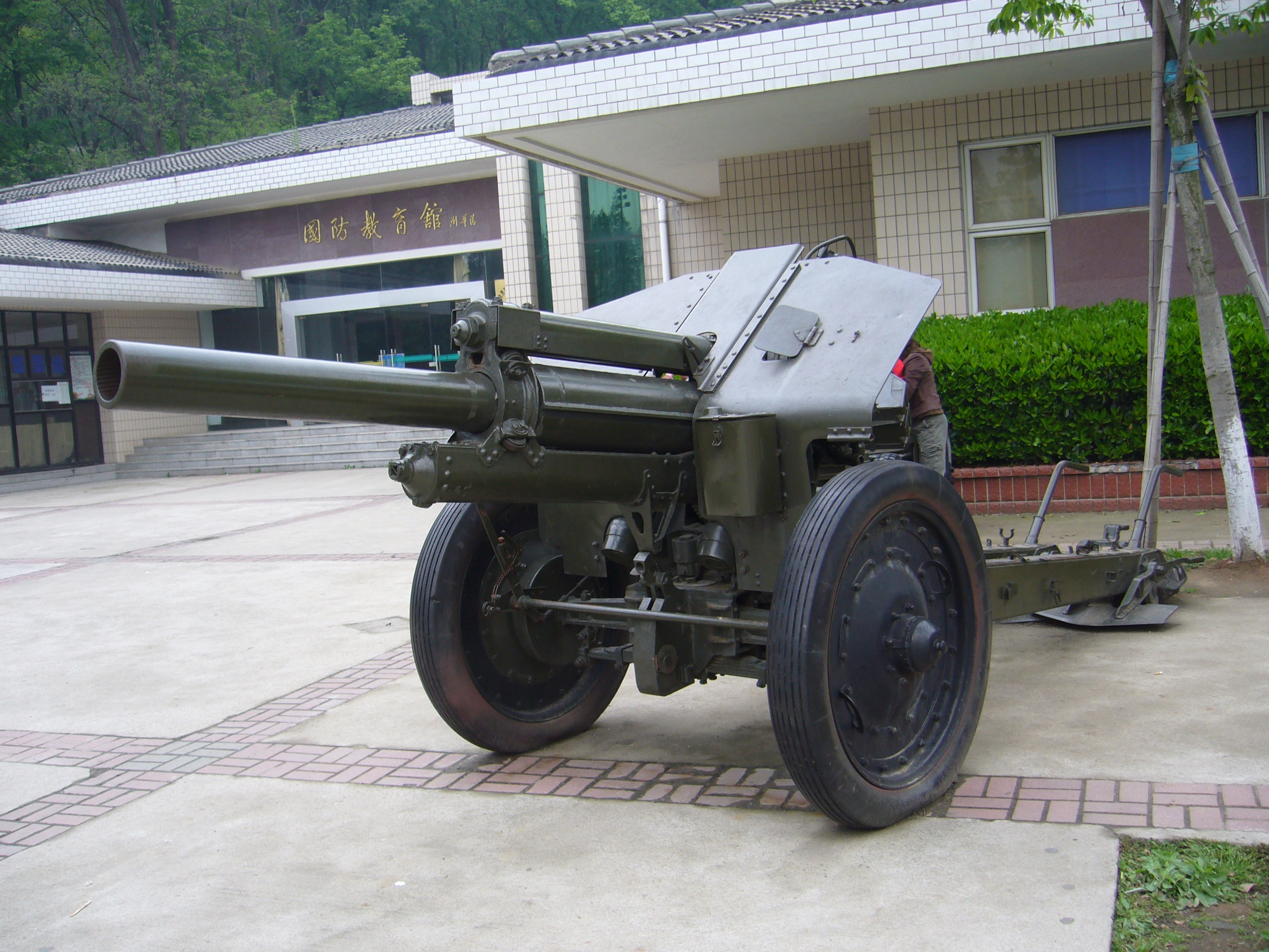 国防园中的火炮(122MM榴弹炮)